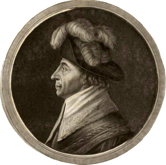 Portrait d'Emmanuel-Joseph Sieyès en médaillon au-dessus d'une représentation du 18 brumaire an VIII.